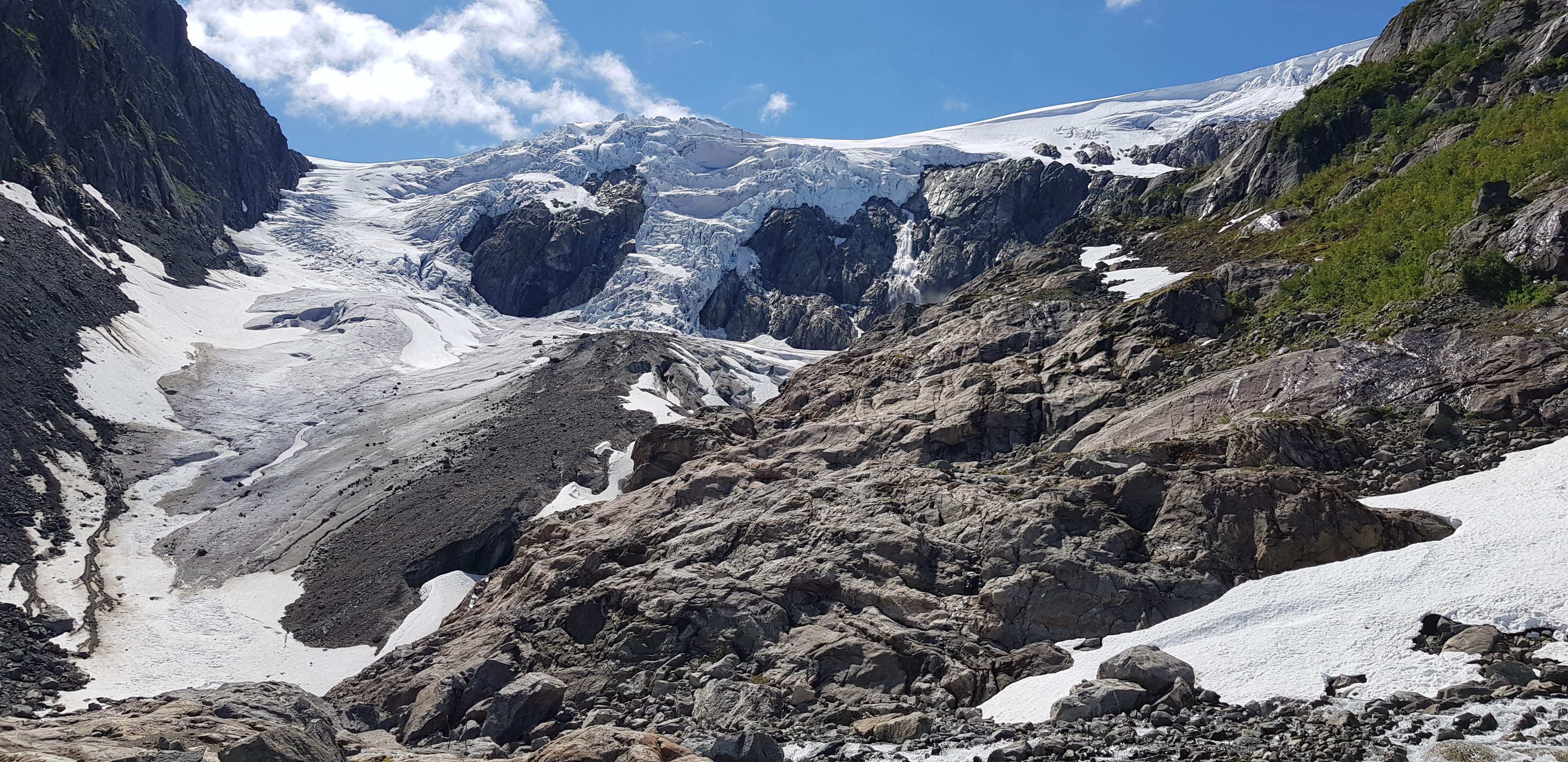 Buerbreen juli 2020.